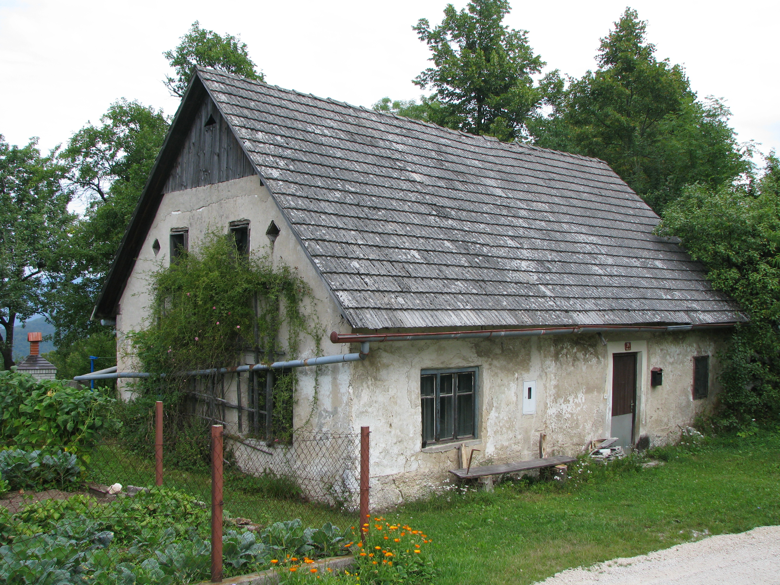 Zaselek Kraje, del vasi Konjšica, hišna številka 31